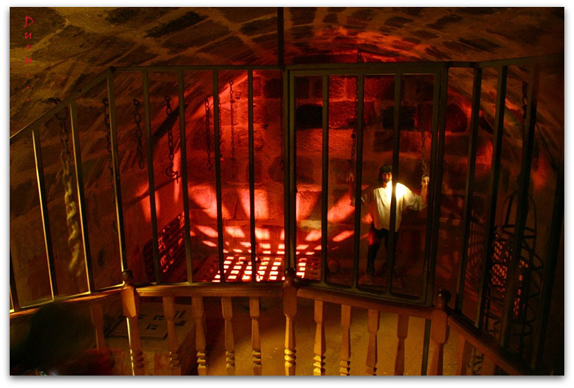 Zindan / Prison...